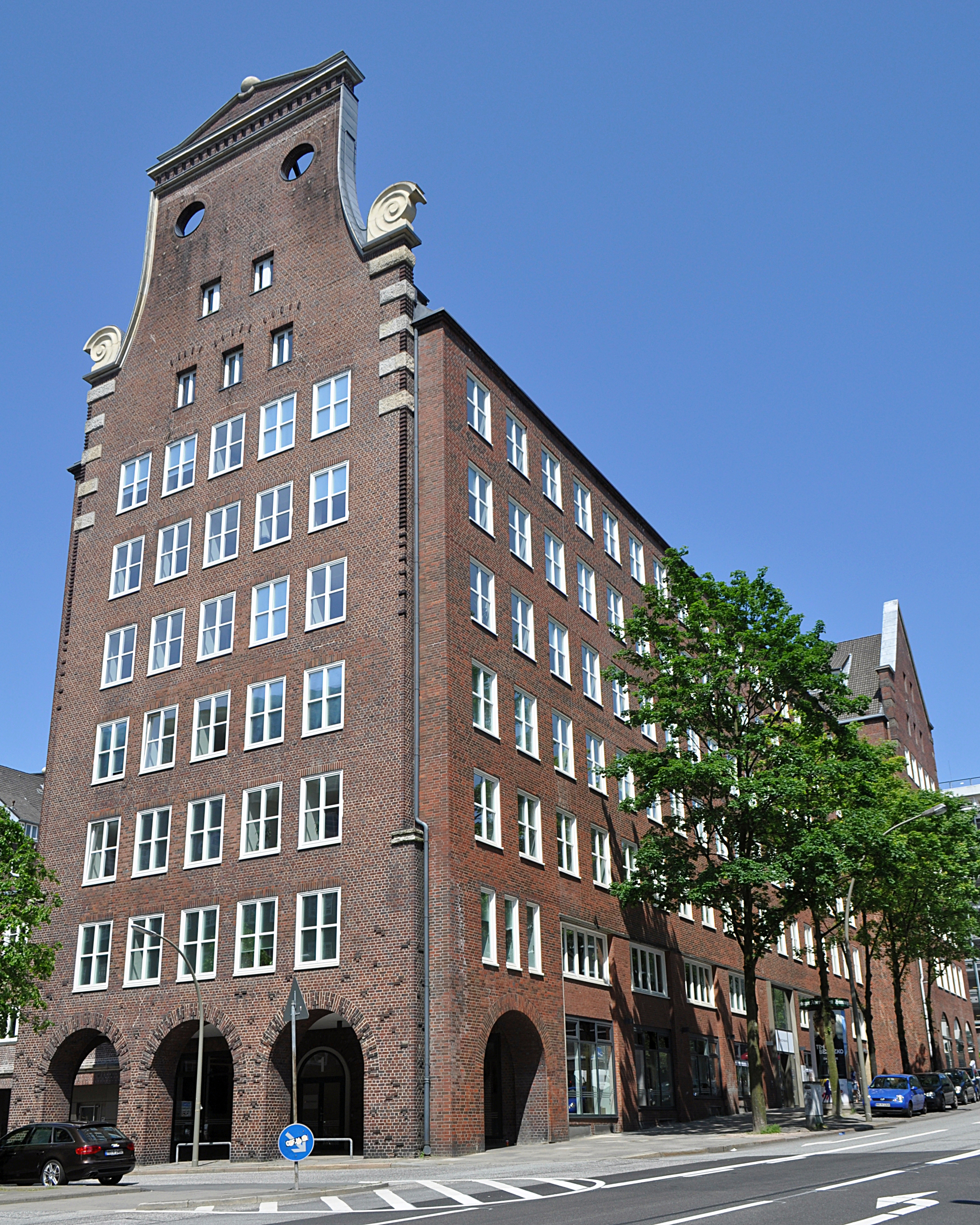 Bartholomayhaus in Hamburg-Altstadt. This is a photograph of an architectural monument.